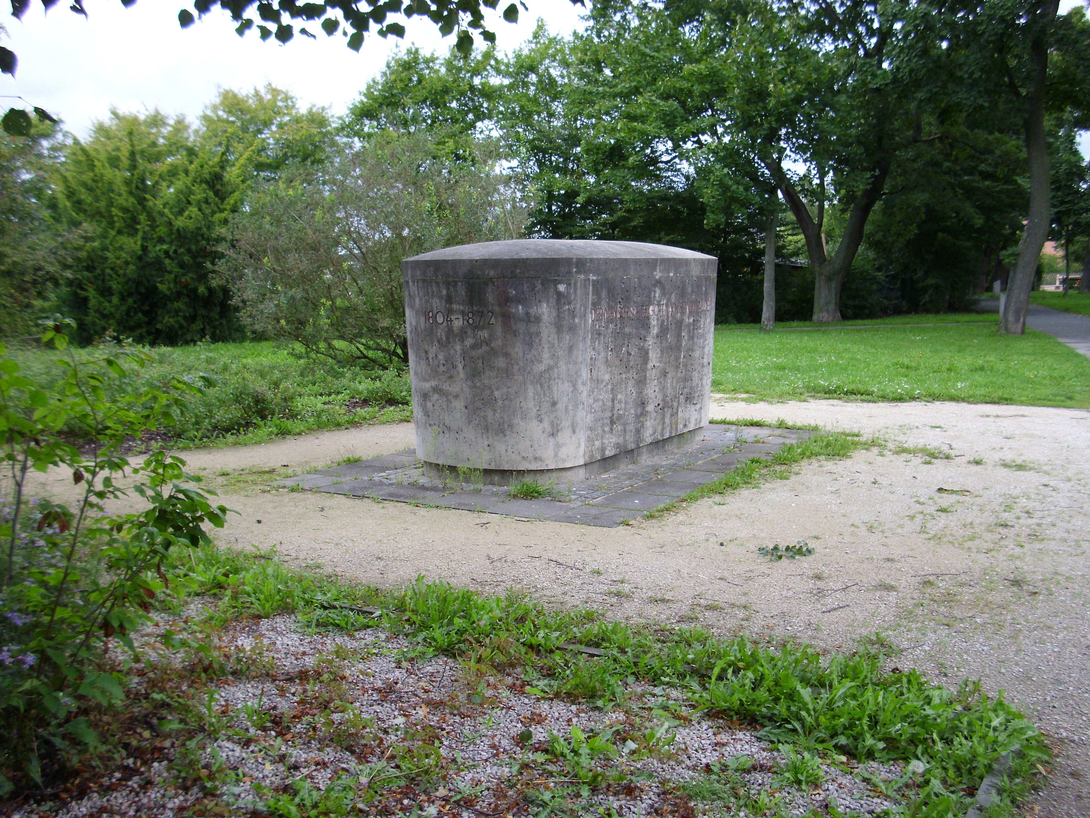 Scheingrab aus dolomitischem Kalkstein mit den Inschriften Dem Freidenker Ludwig Feuerbach zum Gedächtnis und 1804–1872 auf den Stirnseiten und den Feuerbachzitaten Tue das Gute um des Menschen Willen und Der Mensch schuf Gott nach seinem Bilde auf den Längsseiten. Es wurde am 21. September 1930 eingeweiht, im Juli 1933 abgerissen und im Oktober 1955 an alter Stelle wieder aufgebaut.